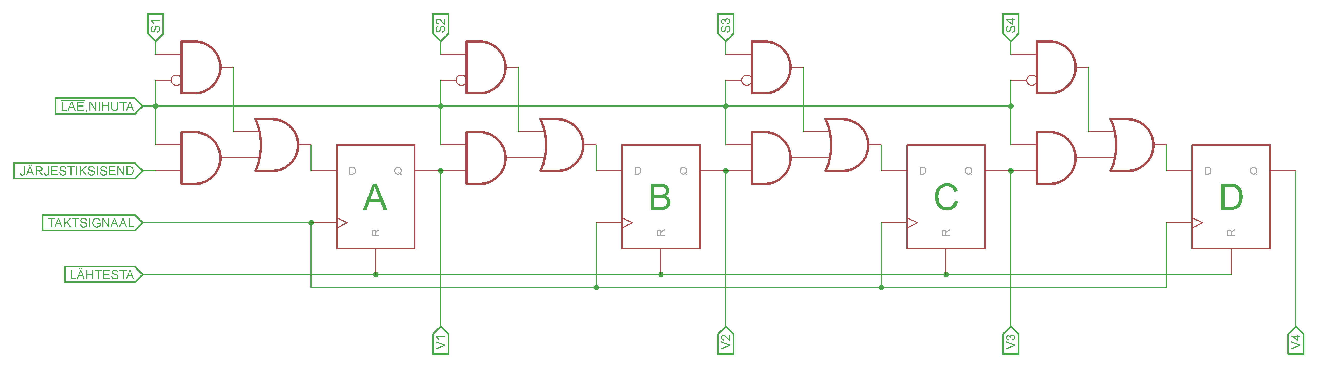 D-trigeritest koostatud Paralleelsisend paralleelväljund nihkeregister